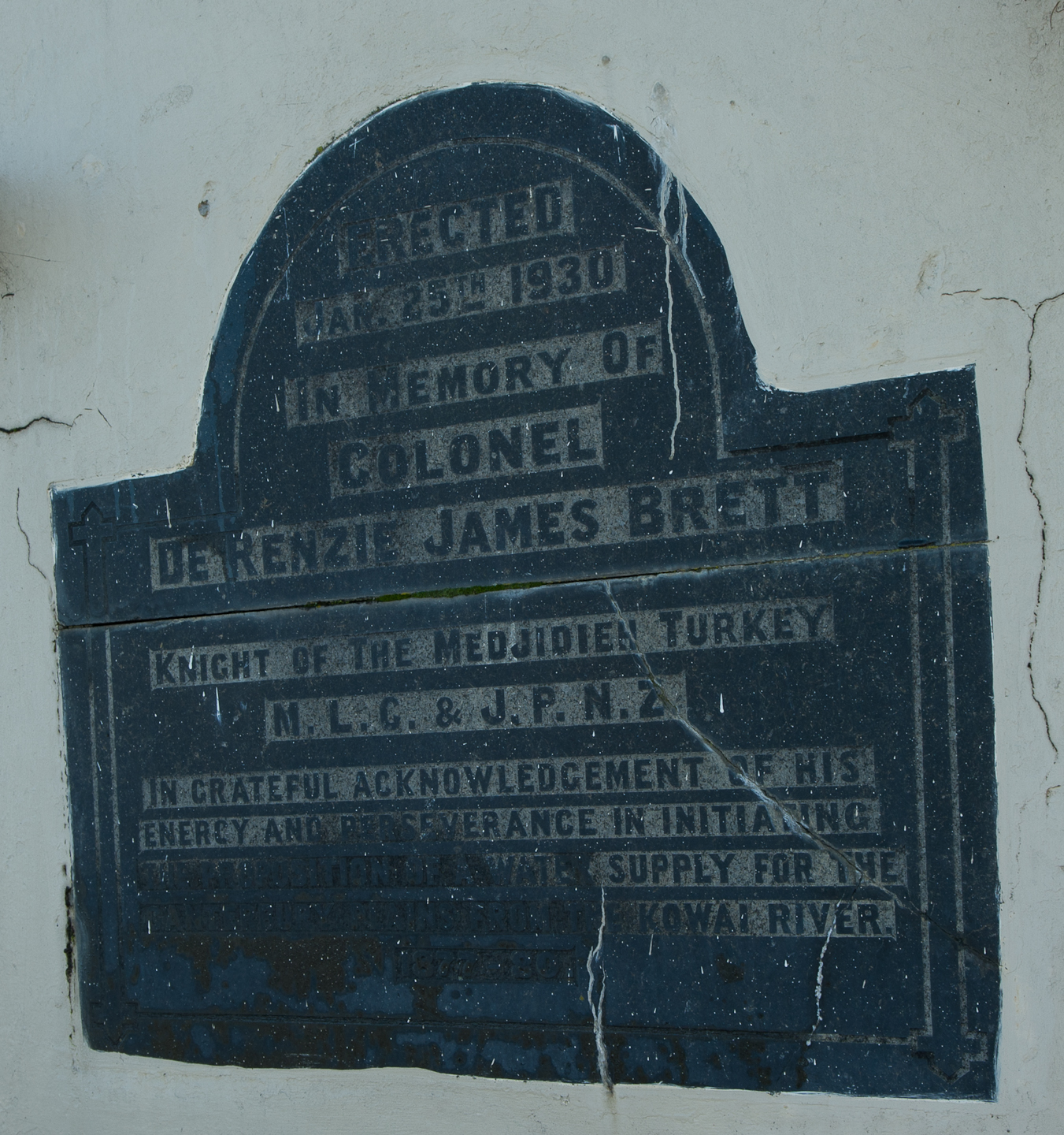 Detail of Kirwee monument commemorating De Renzie Brett.